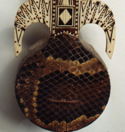 Beschreibung, Quelle und Lizenz Mit Schlangenhaut bespannter Korpus einer Rewapu Foto: bodok